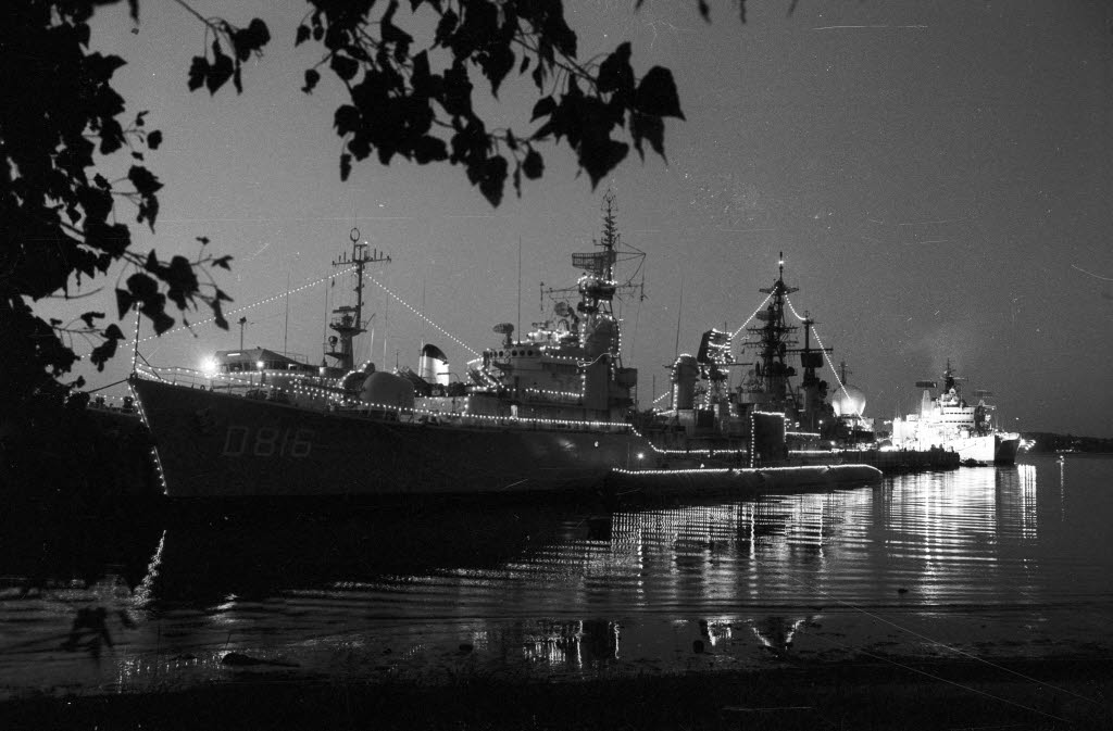 mit Beleuchtung bei Nacht. In der Bildmitte der Zerstörer DRENTHE (niederl., D 816), davor das U-Boot DOLFIJN (niederl.). Im Hintergrund rechts der Leichte Kreuzer TIGER (brit., C 20).